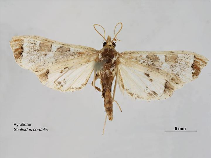 Sceliodes cordalis, dorsal view.